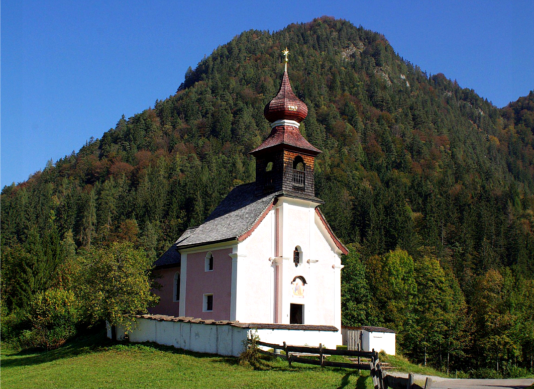 Kath. Filialkirche hl. Antonius von Padua. Im Hintergrund der Lenzenkogel (989m).